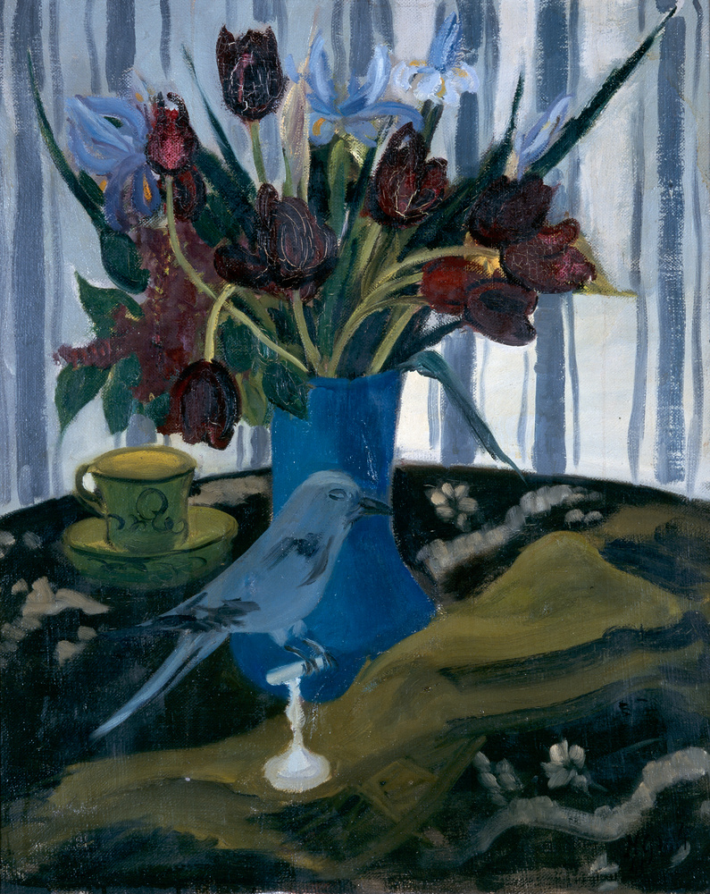 Nature morte. Vase de fleurs. Oiseau